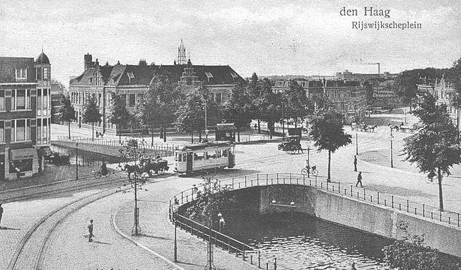 ansicht Rijswijkseplein, Den Haag 1923